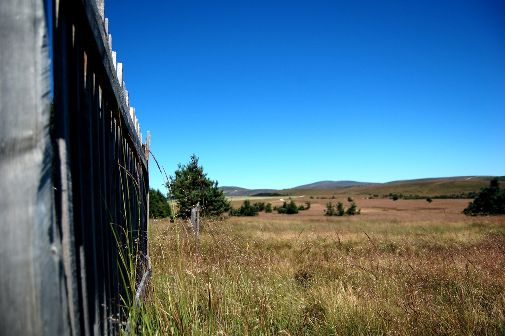 Jasserie dans les Monts du Forez